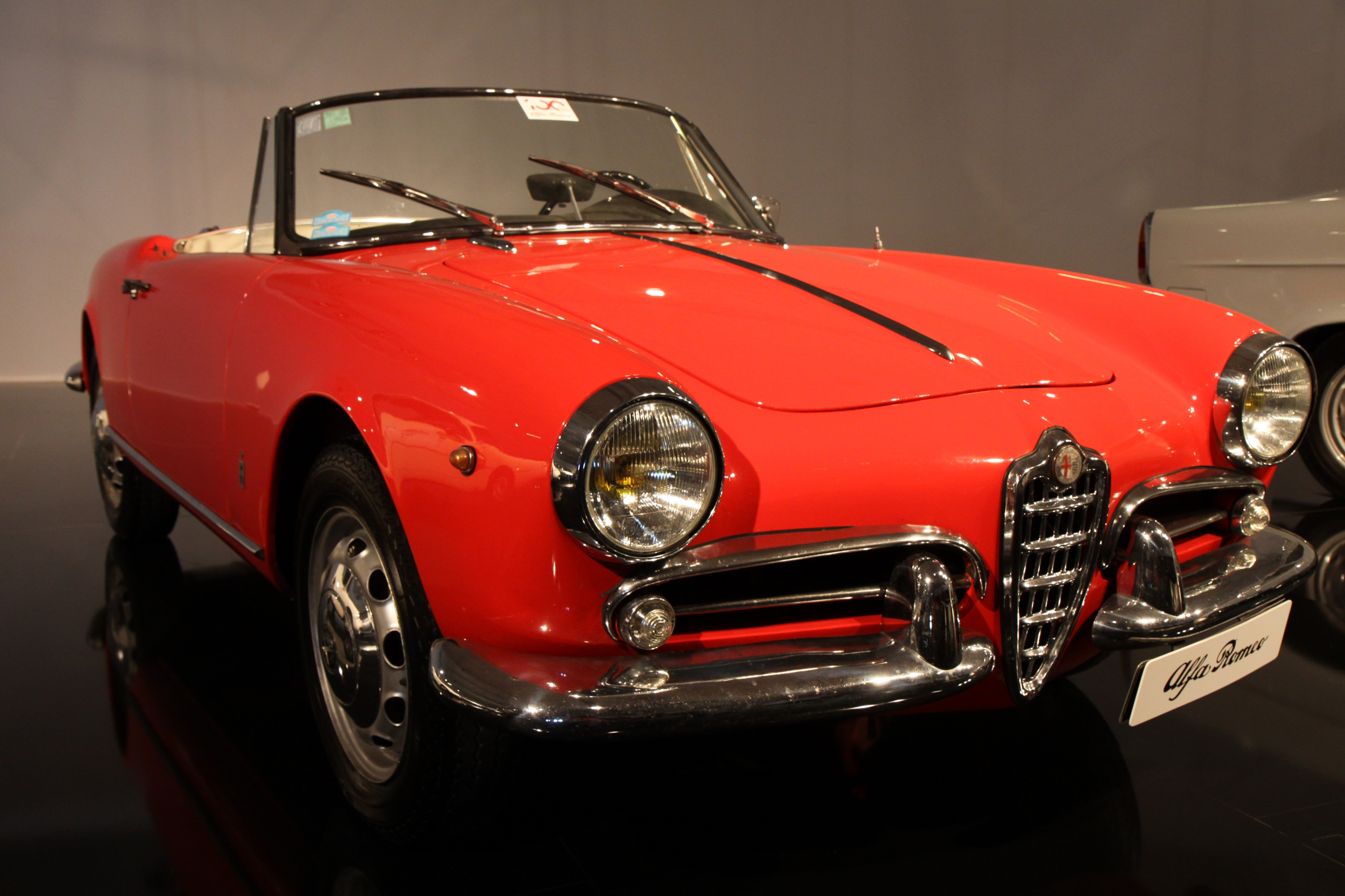 Paris - Mondial de l'automobile 2010